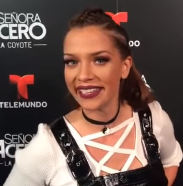 🍭 Conoce a fondo a Carolina Miranda conocida como "La señora acero, La Coyote" by Dulce Osuna